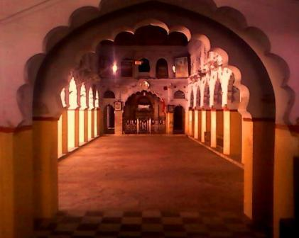 यह भगवान गणेश का प्राचीन मंदिर है.जहा हर बुधवार को सैकड़ो भक्त दर्शन का लाभ लेते है . यहाँ पर गणेश चतुर्थी को प्रातः काल और सायं काल अभिषेक होता है .साधारणतः यहाँ सायं काल के अभिषेक मे बहुत भीड़ होती है. ऐसी मान्यता है की इस गणेश मूर्ति के प्रतिदिन इक्कीस परिक्रमा लगाने से अप्रत्यक्ष लाभ होता है और मनोकामनाये पूर्ण होती है .